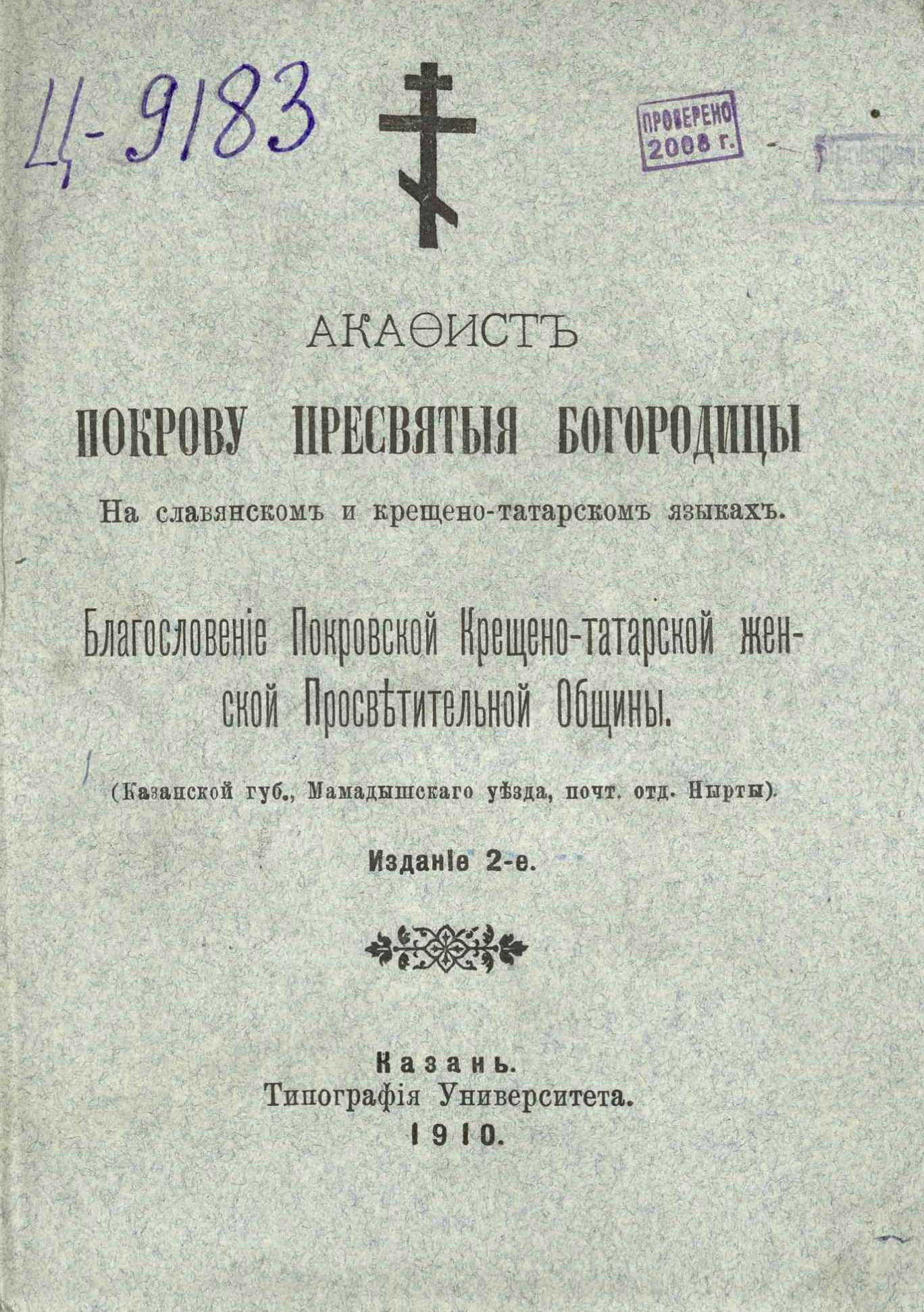 Обложка «Акафиста Покрову Пресвятыя Богородицы. На славянском и крещёно-татарском языках» (Казань, 1910 г.). Сканировано из: Акафист Покрову Пресвятыя Богородицы. На славянском и крещёно-татарском языках. Благословение Покровской Крещёно-татарской женской Просветительной Общины (Казанской губ., Мамадышского уезда, почт. отд. Нырты)// Издание 2-е. – Казань: Типография Университета, 1910. – Обложка.